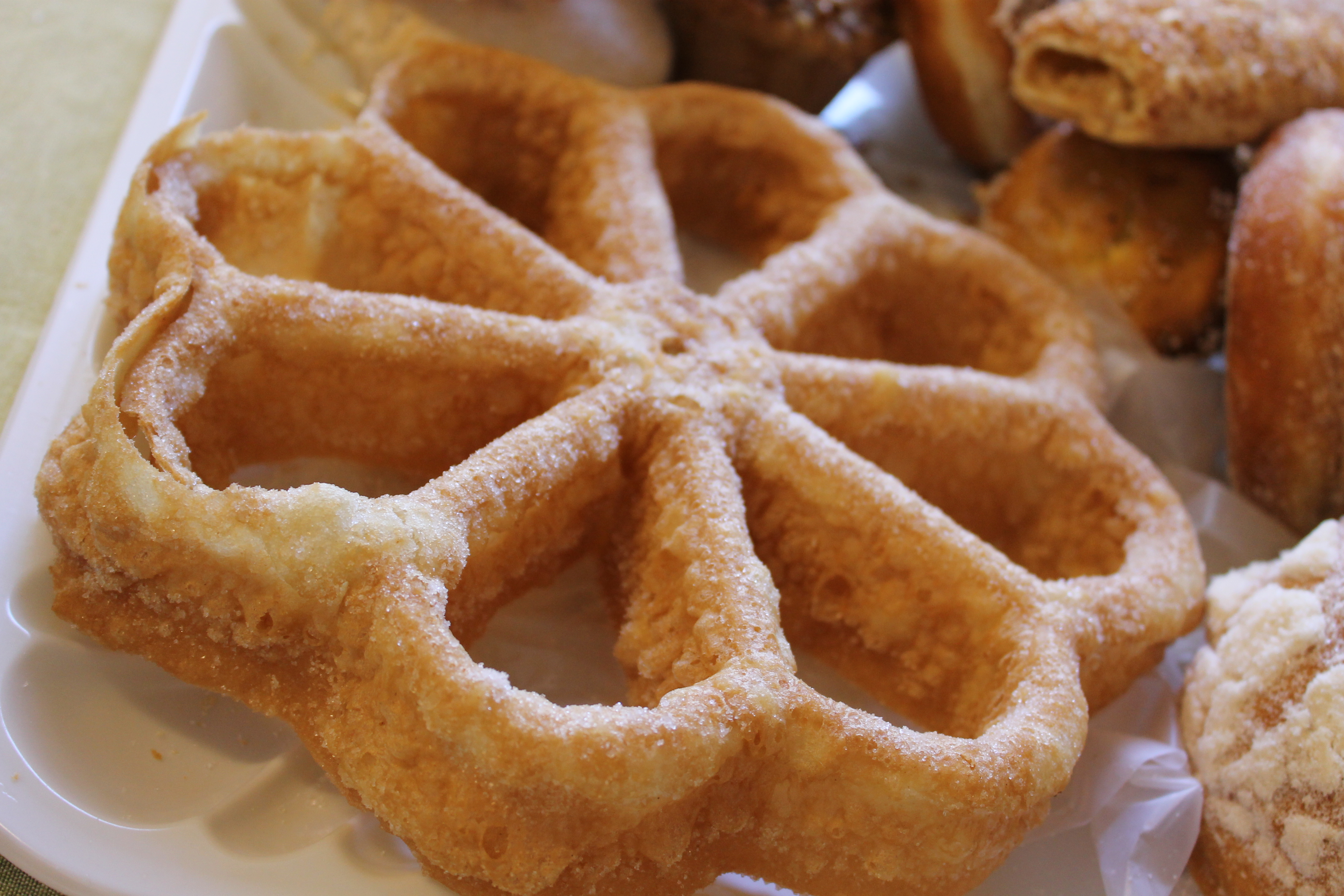 Es una variante del buñuelo tradicional de México